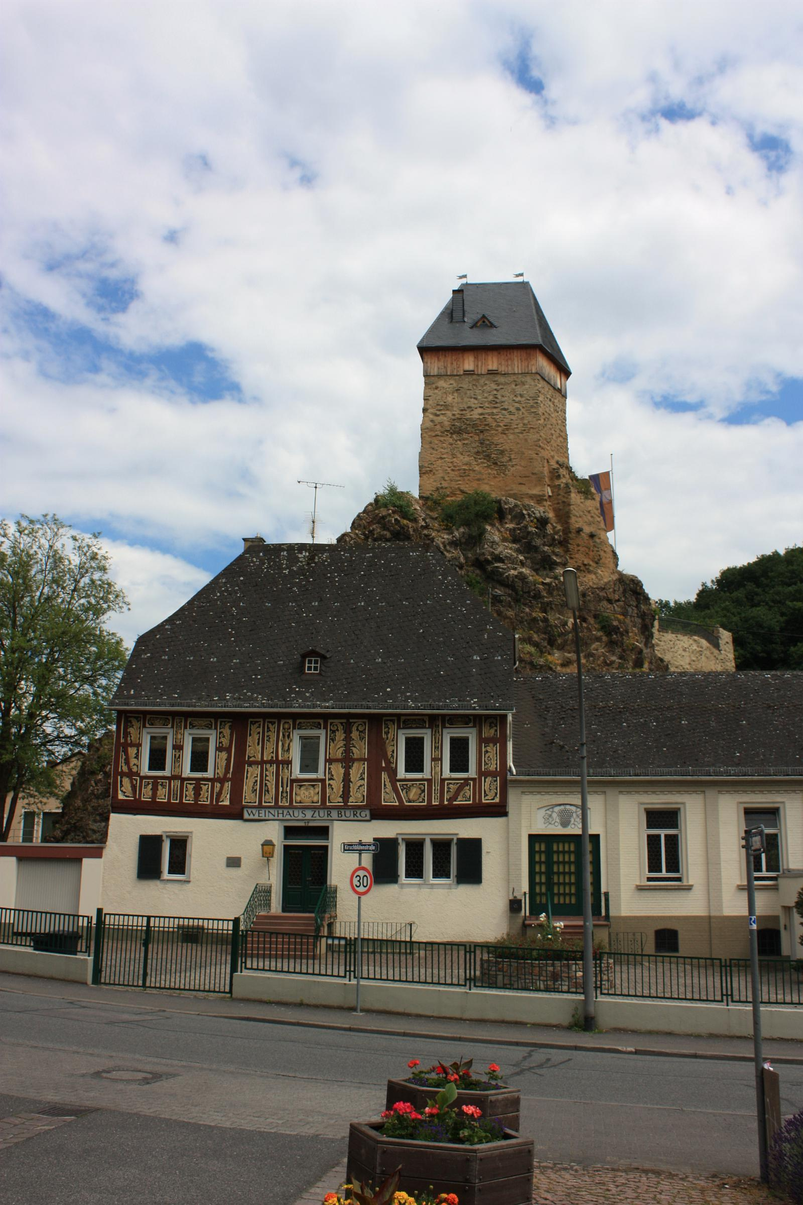 Burg Frauenstein, Wiesbaden, Hessen, Deutschland